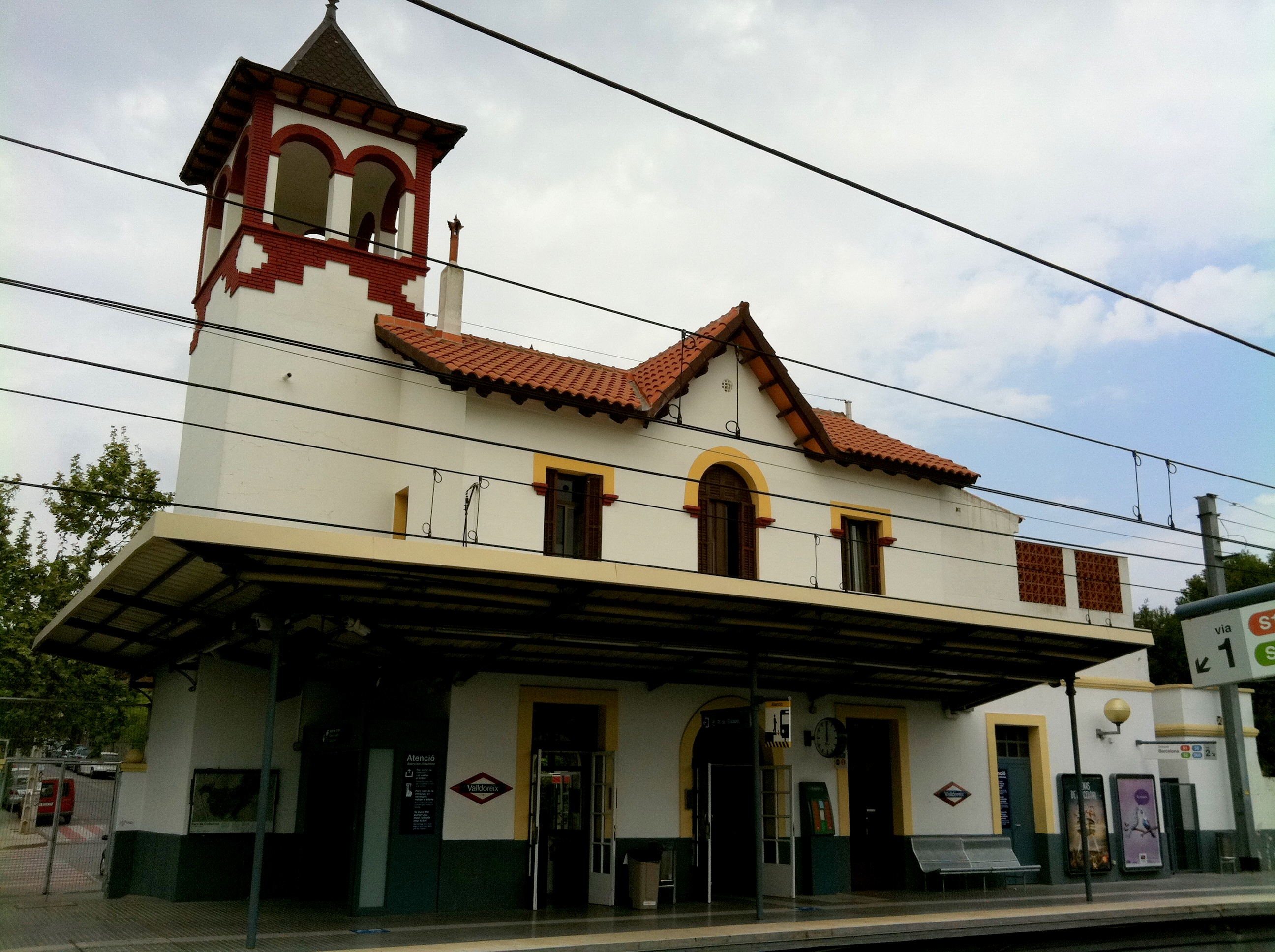 Estació de Valldoreix